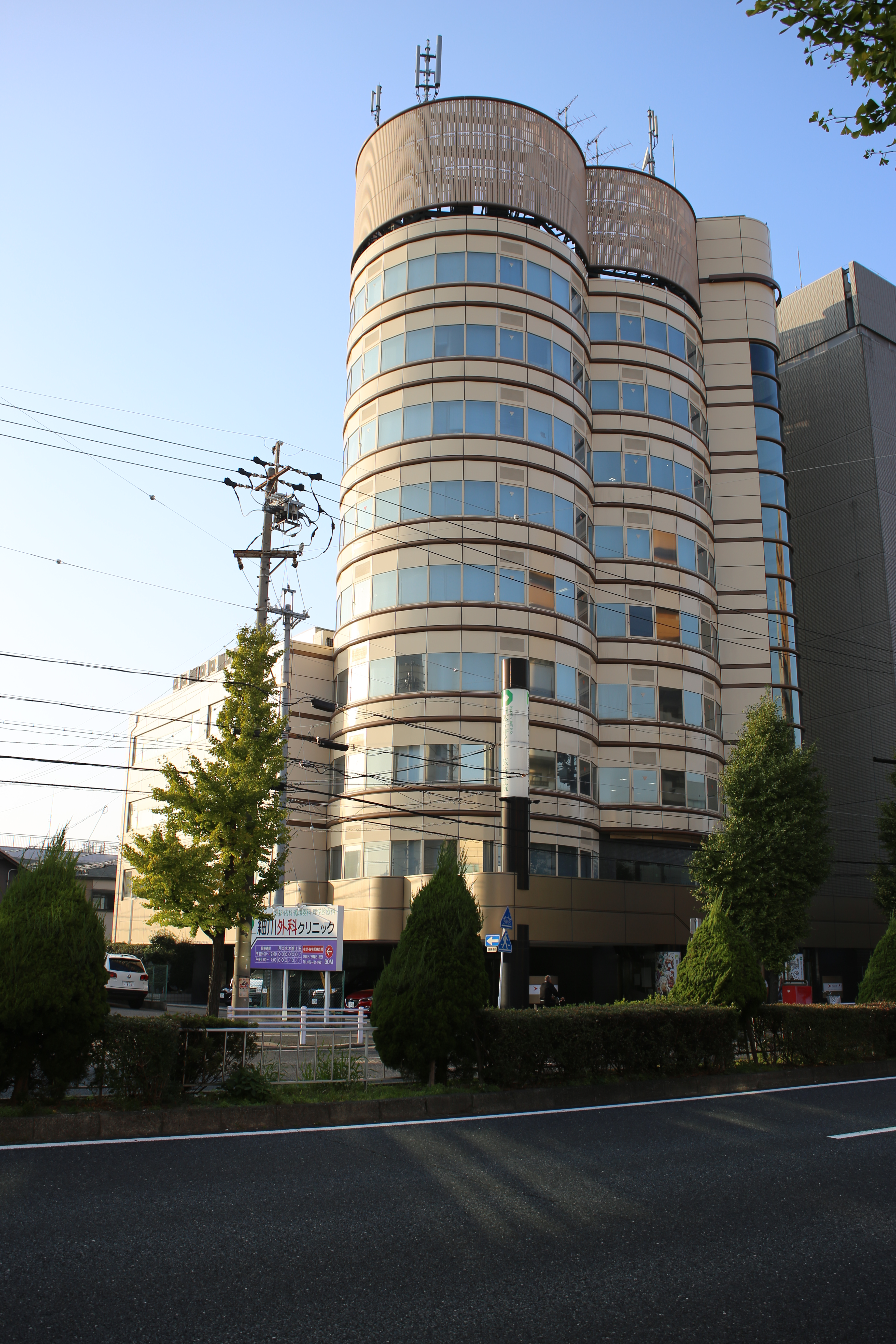 名古屋市中村区黄金通の専門学校日本デザイナー芸術学院 名古屋校・日本マンガ芸術学院 名古屋校を東側公道南側より撮影